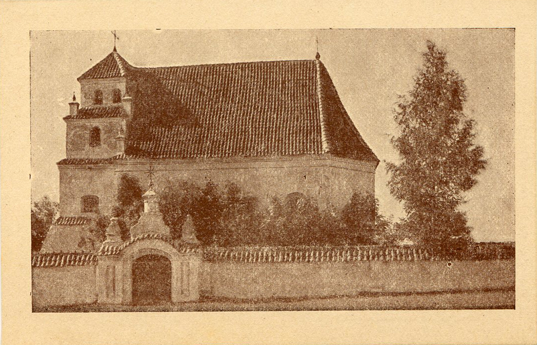 Беларуская (тарашкевіца): Асташын (Astašyn). Кальвінскі збор